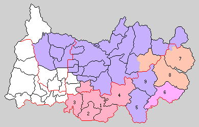 奈良県山辺郡の町村制時点の町村。